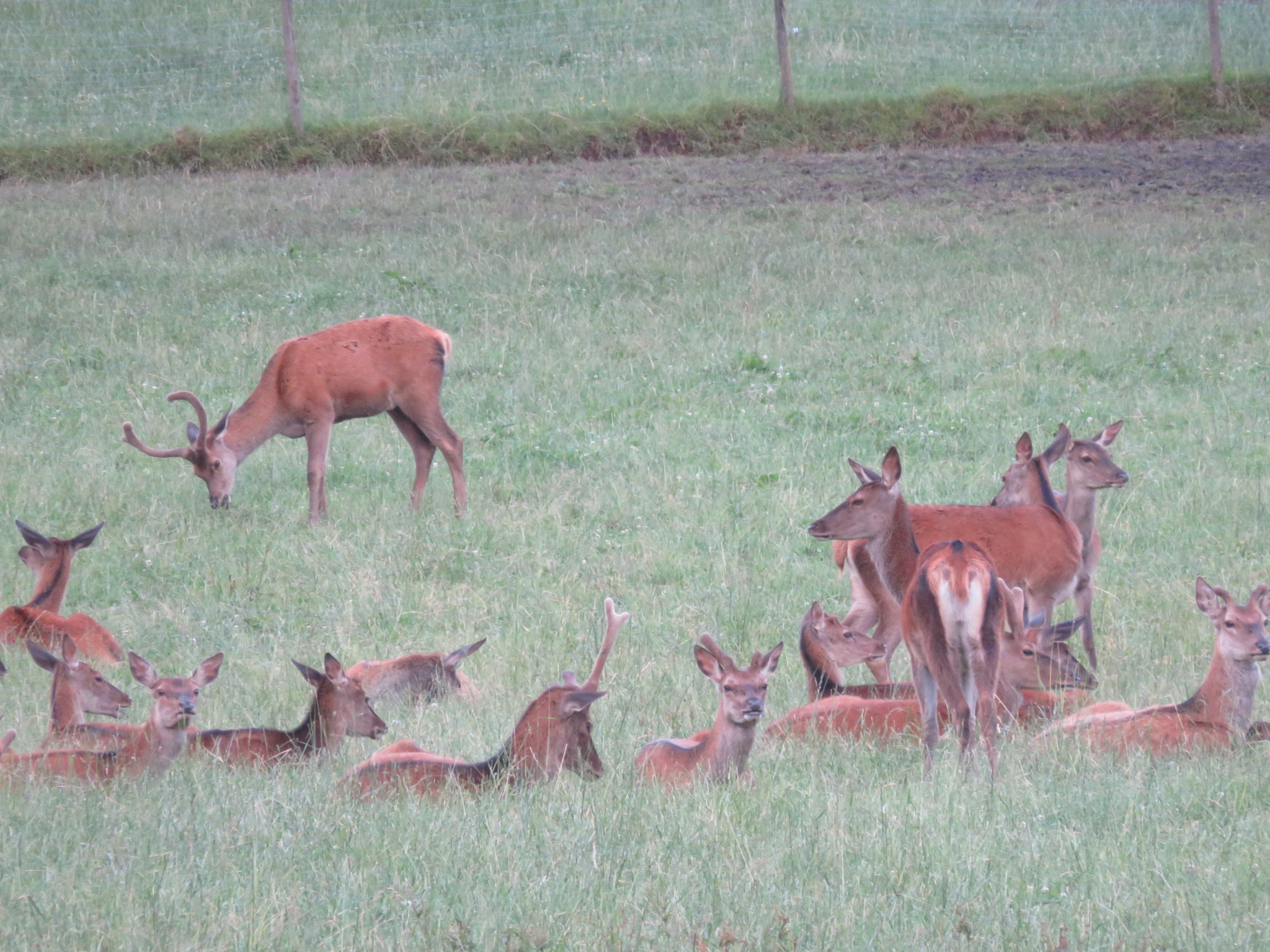 Deer parks in Andechs